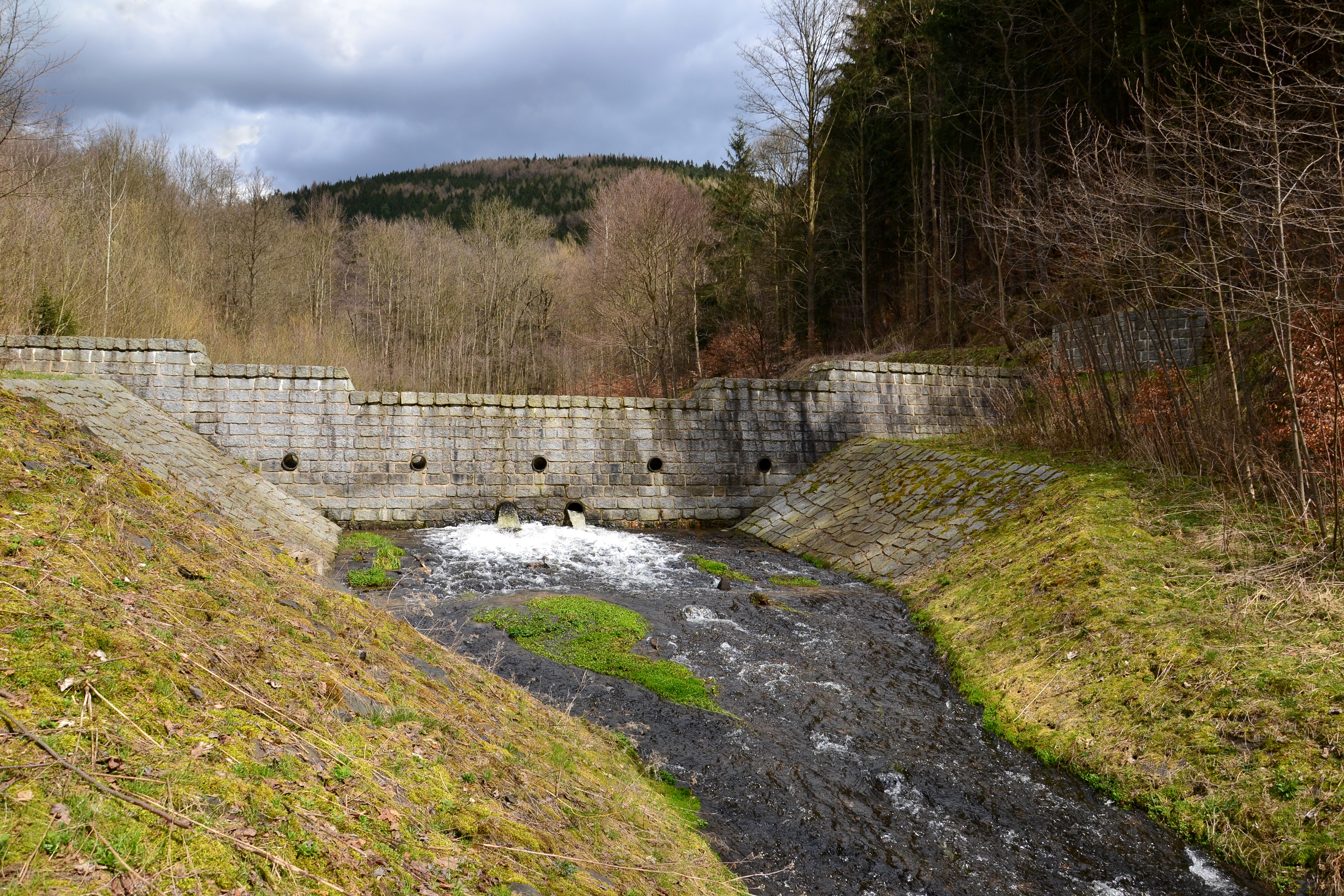 Přehrážka pod Údolíčkem